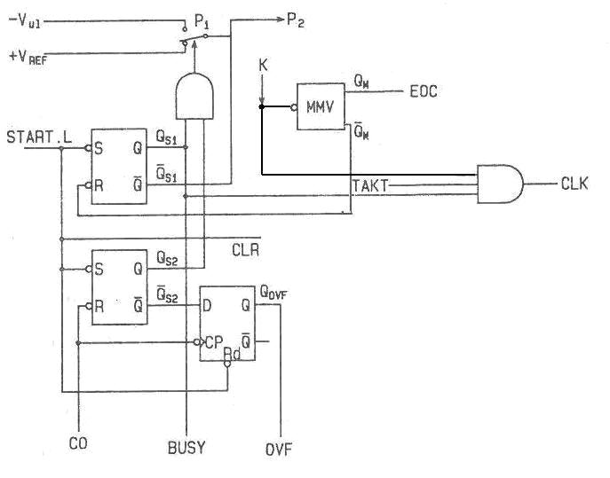 Kontrolna logika ADC sa dvojnom integracijom